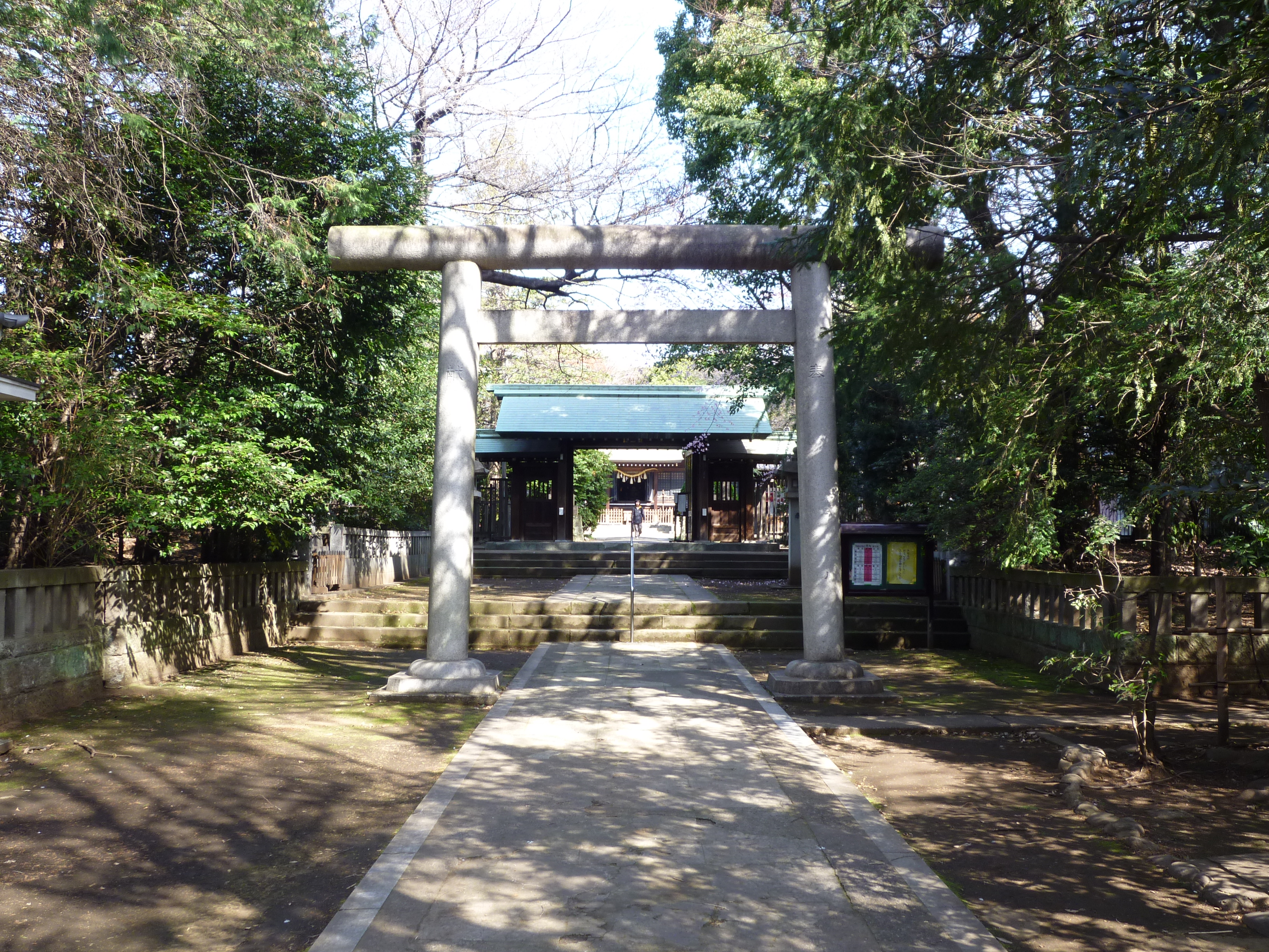 根村氷川神社